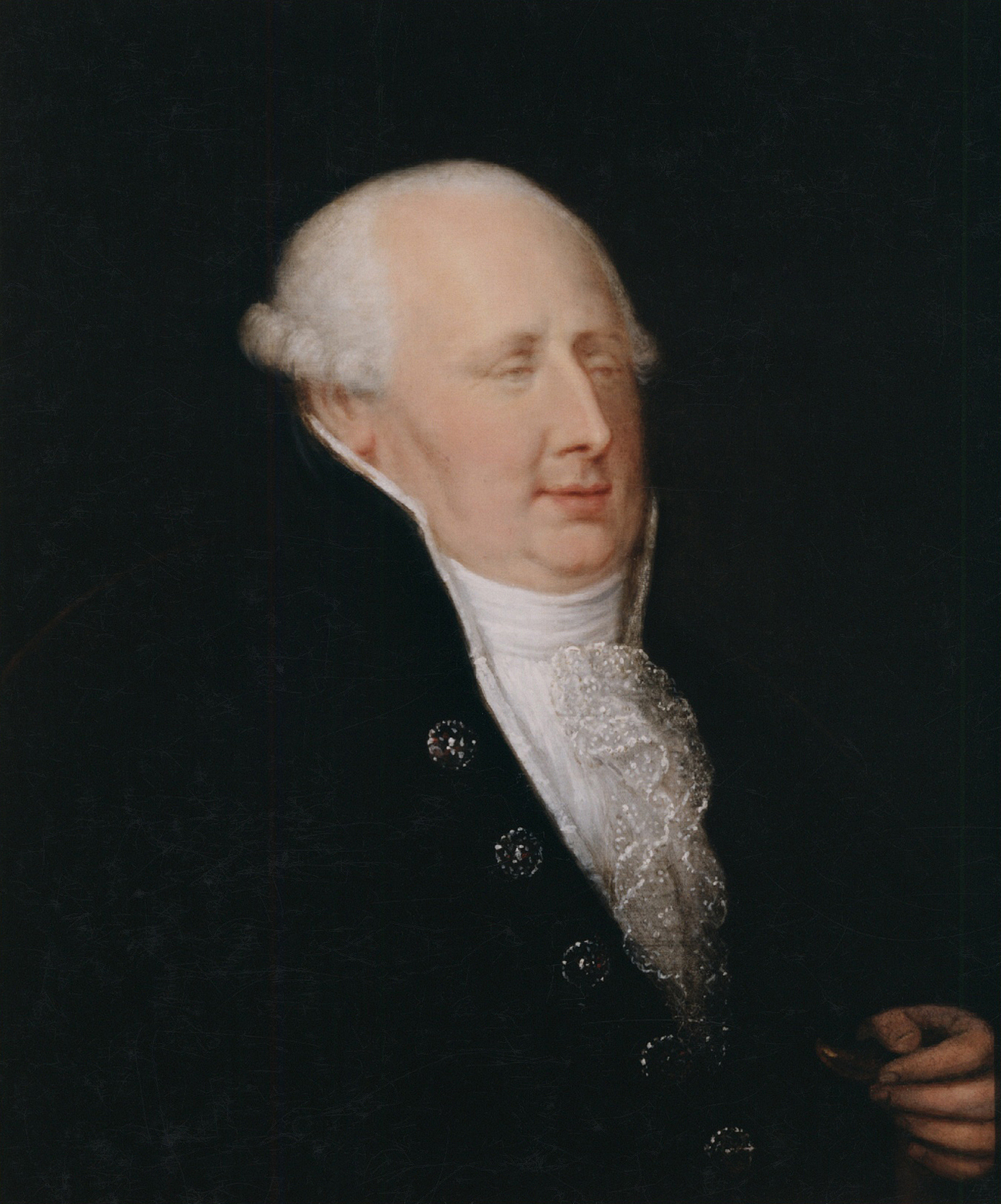 Portret van Louis-Engelbert van Arenberg (1750-1820)